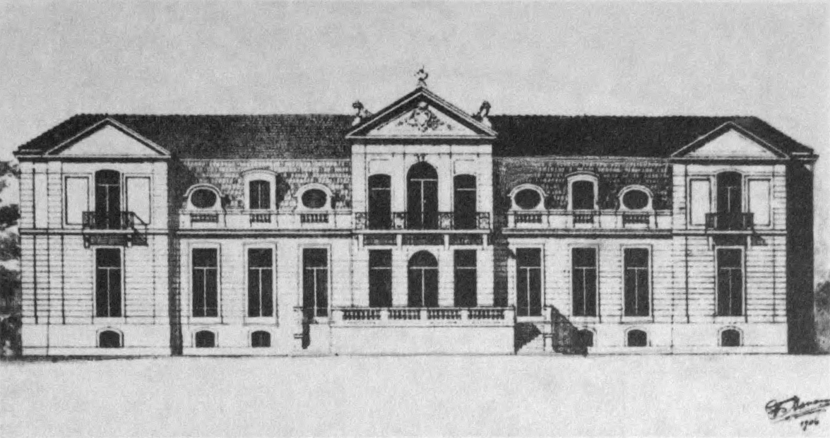 Беларуская (тарашкевіца): Сіняўка (Siniaŭka), сядзіба Барэйкаў (Barejka). Праект палаца